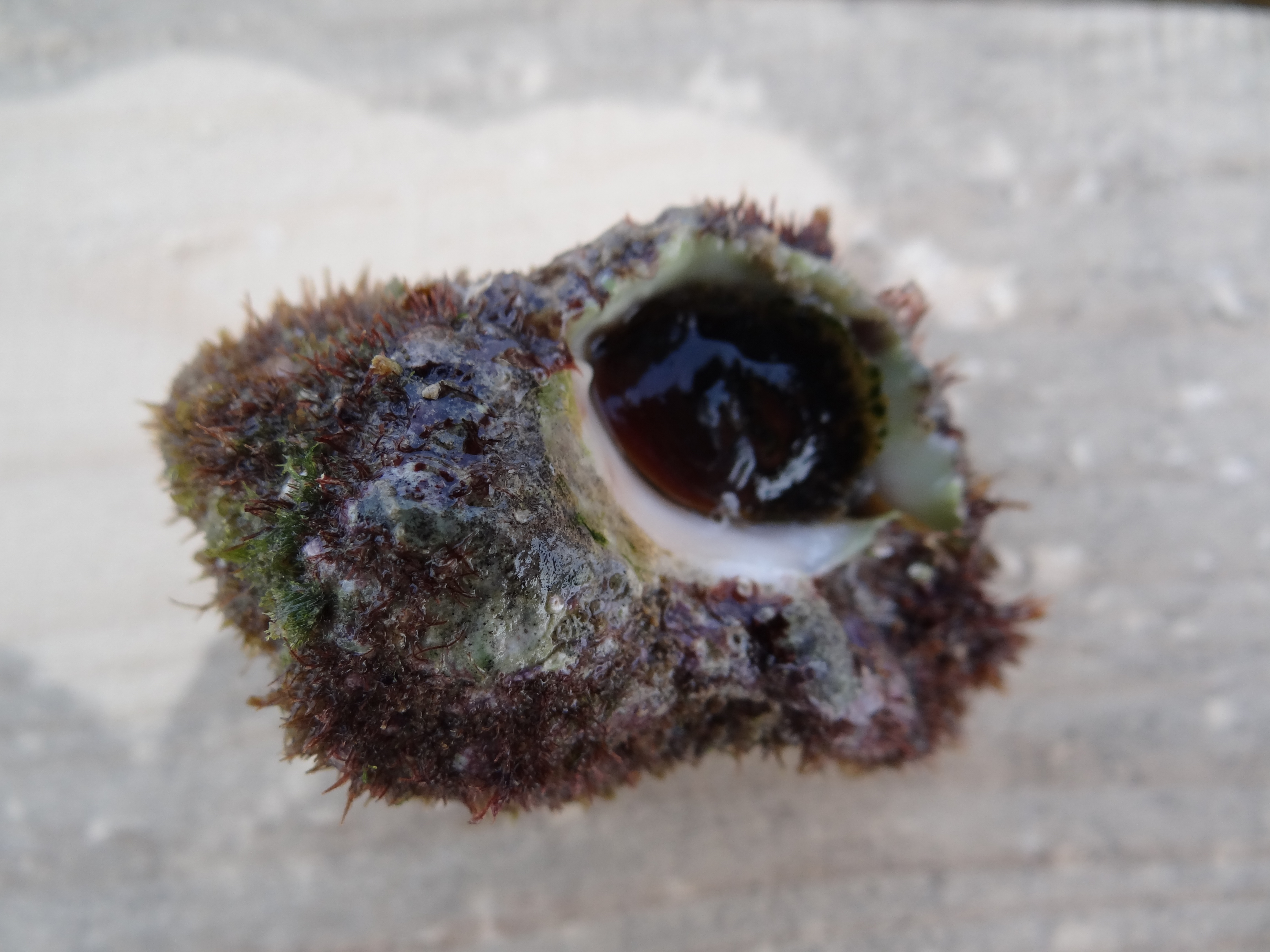 Hexaplex trunculus is a medium-sized species of sea snail was found on the north part of Israeli coastal plain near Tel Shikmona ארגמון קהה קוצים הוא חילזון ימי טורף ממשפחת הארגמוניים. החילזון חשוב מבחינה היסטורית והלכתית מכיוון ששימש להפקת הצבעים ארגמן ותכלת. בנוסף החילזון משמש למאכל באיטליה, ספרד, יוון ופורטוגל. החילזון החי נמצא בחוף הים במישור החוף הצפוני מול תל שקמונה שנמצאו בהשרידי מבני תעשיה ששימוש כנראה ליצור צבע הארגמן מארגמונים החילזון הוחזר למים לאחר הצילומים